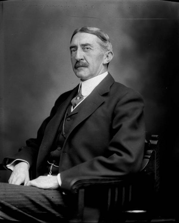 Edwin Alderman, 1912